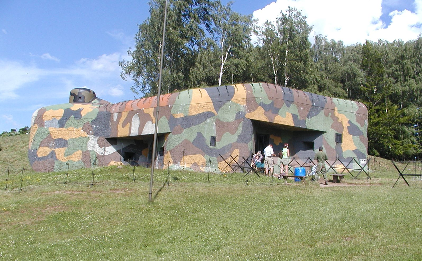 Pěchotní srub N-S 82 "Březinka" v kopci na Náchodem.